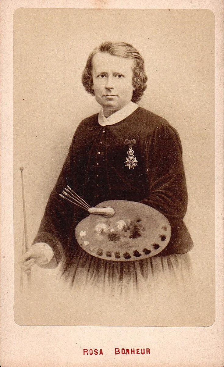 Rosa Bonheur, 1870